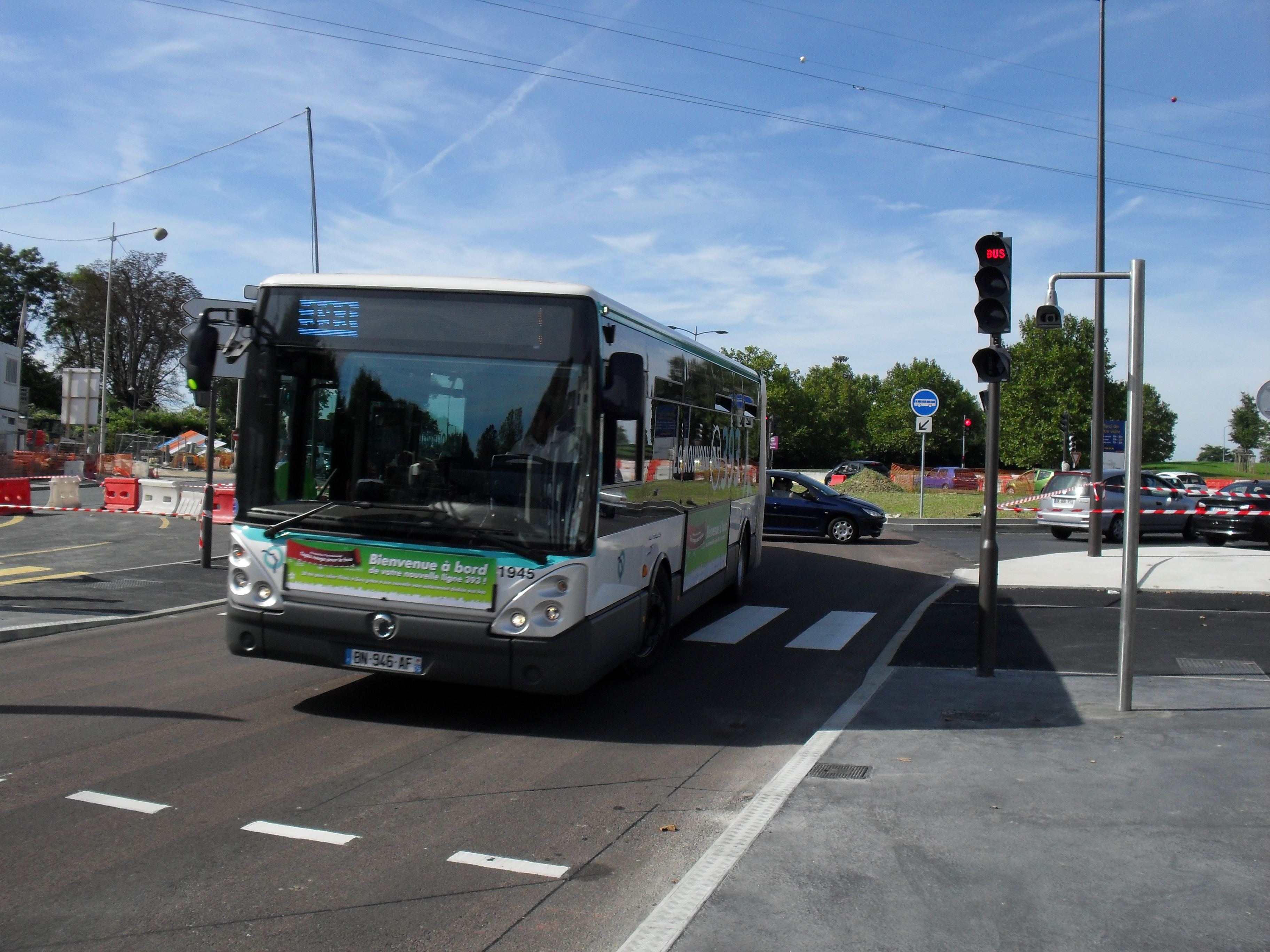 Citelis 18 du TCSP 393 au terminus "Thiais - Carrefour de la Résistance"